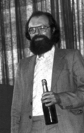 Max Rebattu op het Europees Go Congres 1978 Parijs, met een gewonnen fles champagne.